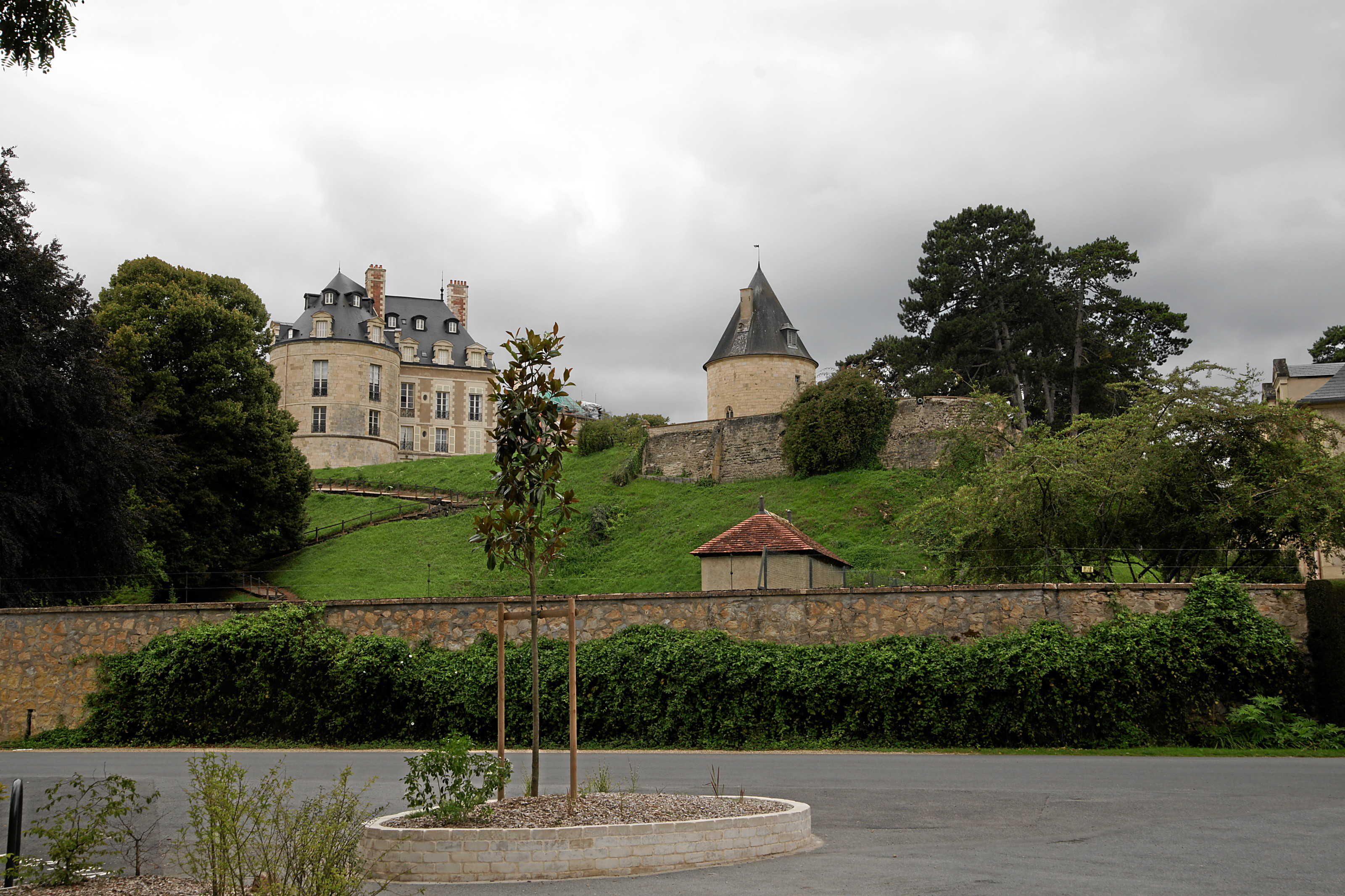 Apremont: Château